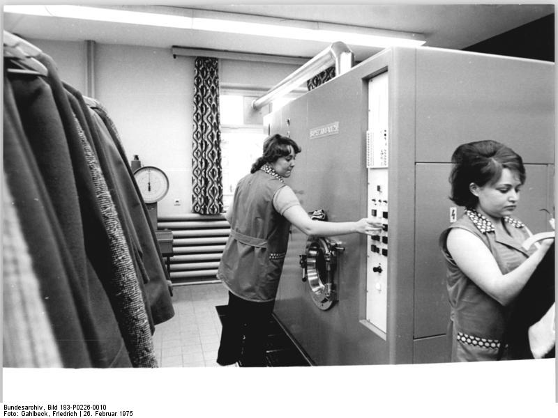 Dommitzsch-Trossin, Blick in die Reinigung ADN-ZB Gahlbeck 26.2.75-gü Bez. Leipzig: Eine große Erleichterung für die 7.000 Bürger des Gemeindeverbandes Dommitzsch-Trossin ist das im vergangenen Jahr erbaute Dienstleistungszentrum im Dommitzsch. Zum "Haus der Dienste", das 20 Leistungen ausführt, gehört auch eine chemische Reinigung. 1975 sollen in allen zum Verband gehörenden Gemeinden Komplexannahmestellen geschaffen werden. (siehe auch 8, 9, 11N!)